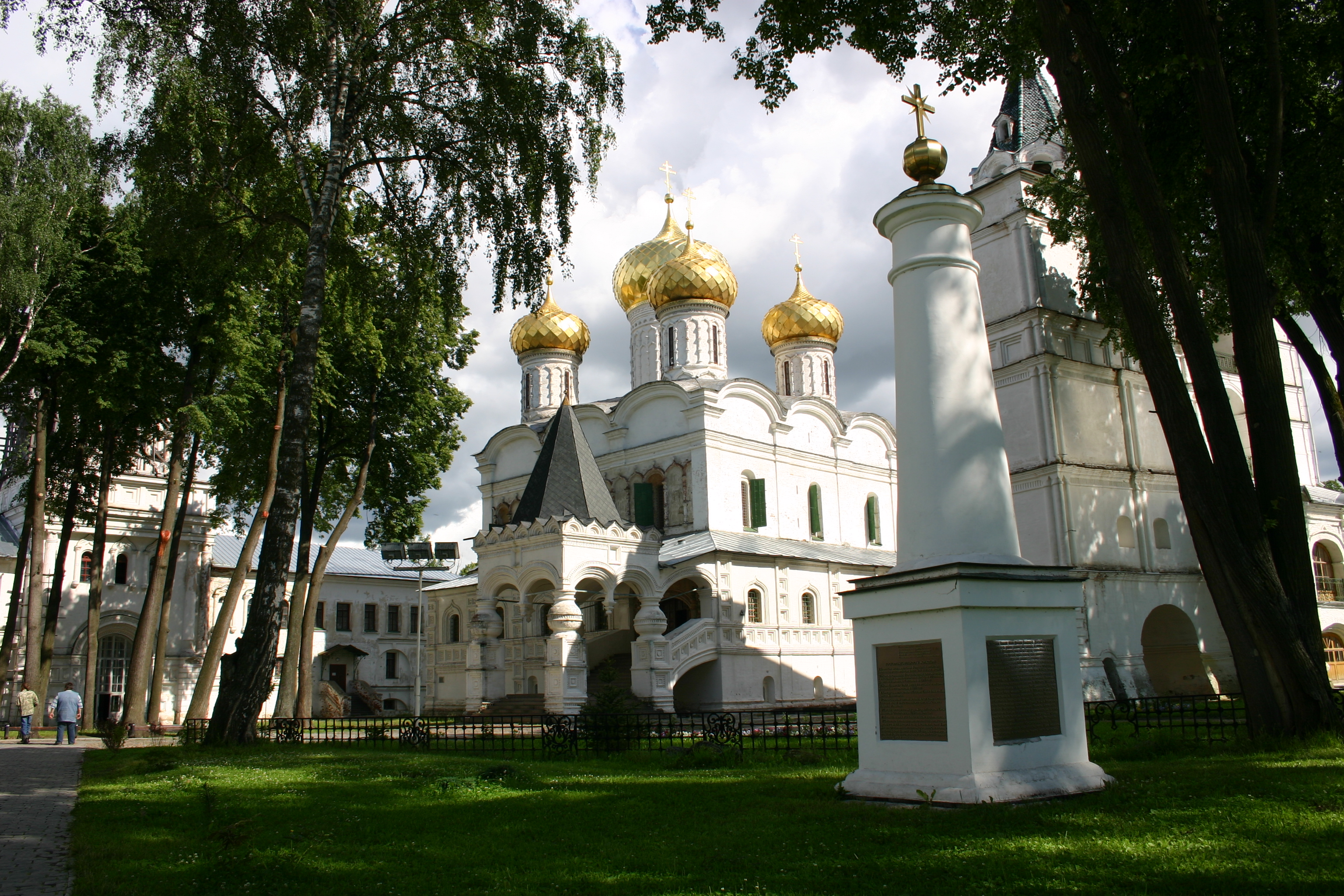 Innenaufnahme des Isopatiosklosters 2005